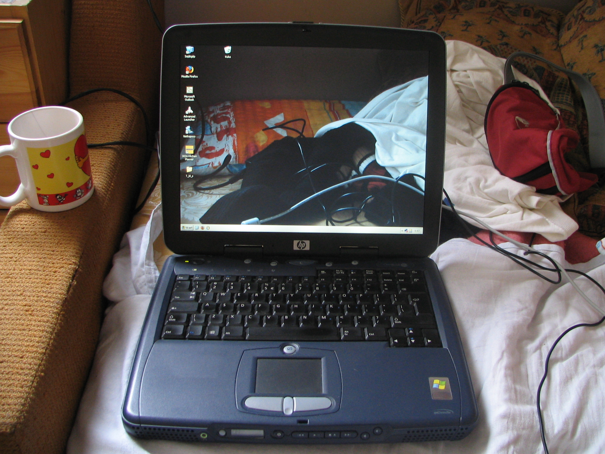 HP OmniBook notebook